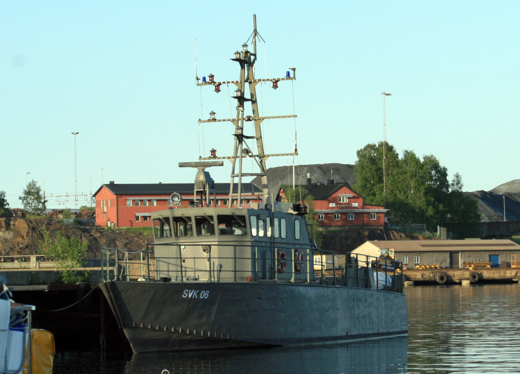 SVK 06 fd Bevakningsbåt 65 Gråskär i Oxelösund 2009-05-29